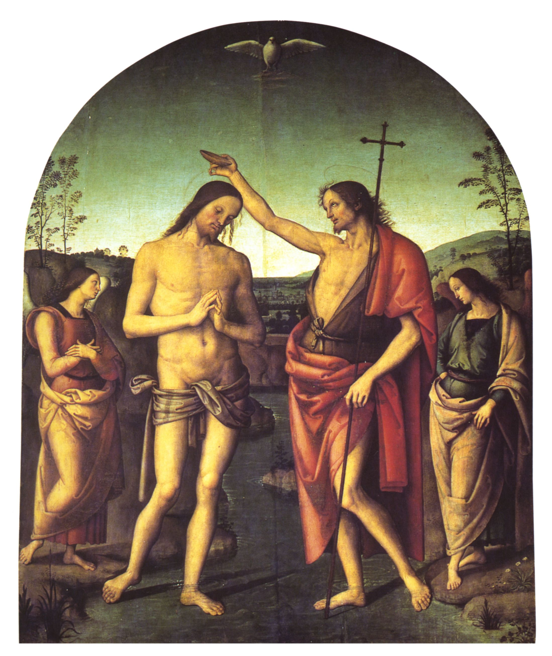 Pietro Perugino: Battesimo di Cristo. Cat. no. 81 in Vittoria Garibaldi: Perugino. Catalogo completo. Octavo, Firenze 2000, ISBN 88-8030-091-1